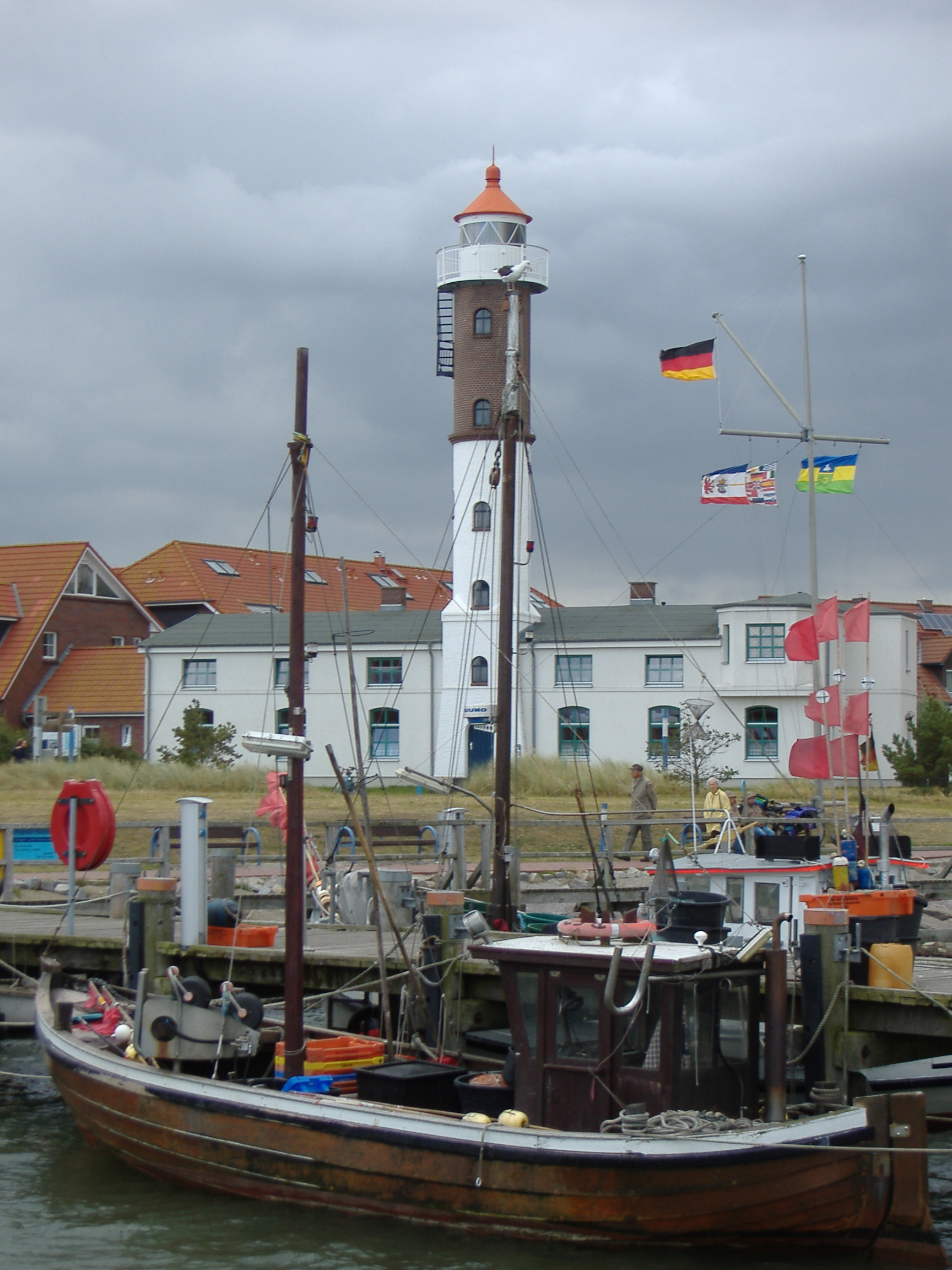 Blick zum Timmendorfer Leuchtturm auf der Insel Poel (Mecklenburg Vorpommern)